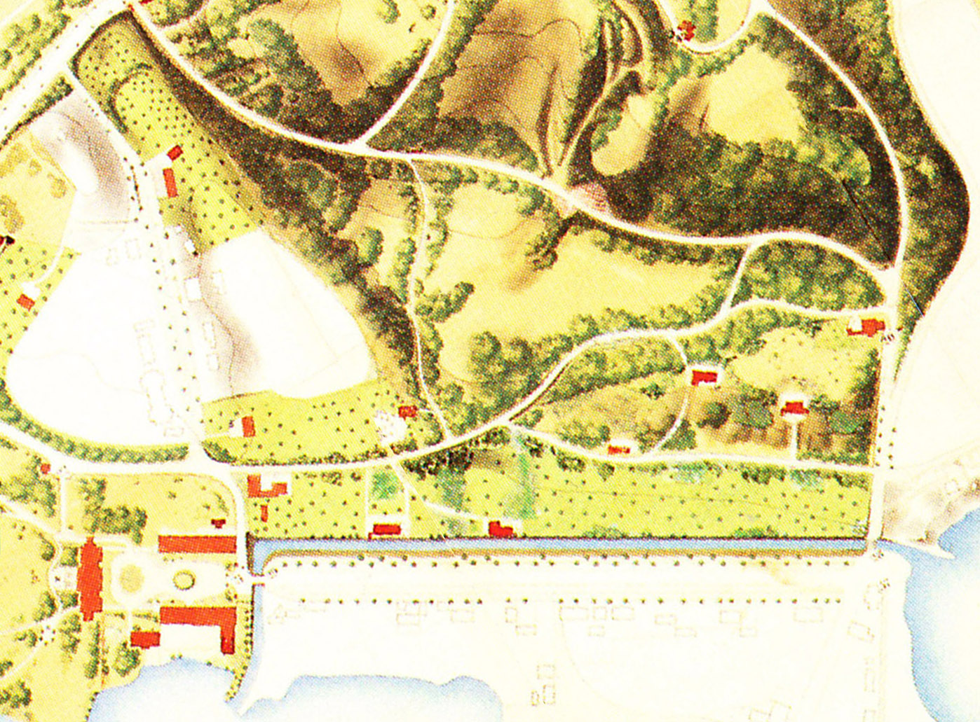 Kraatzplan 1862, Ausschnitt Schweizerhauspartie